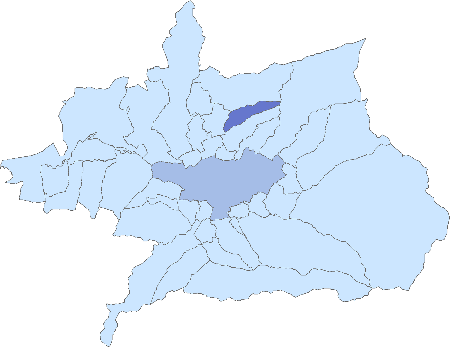 Situación del municipio de Nívar respecto a la comarca de la Vega de Granada, en España.